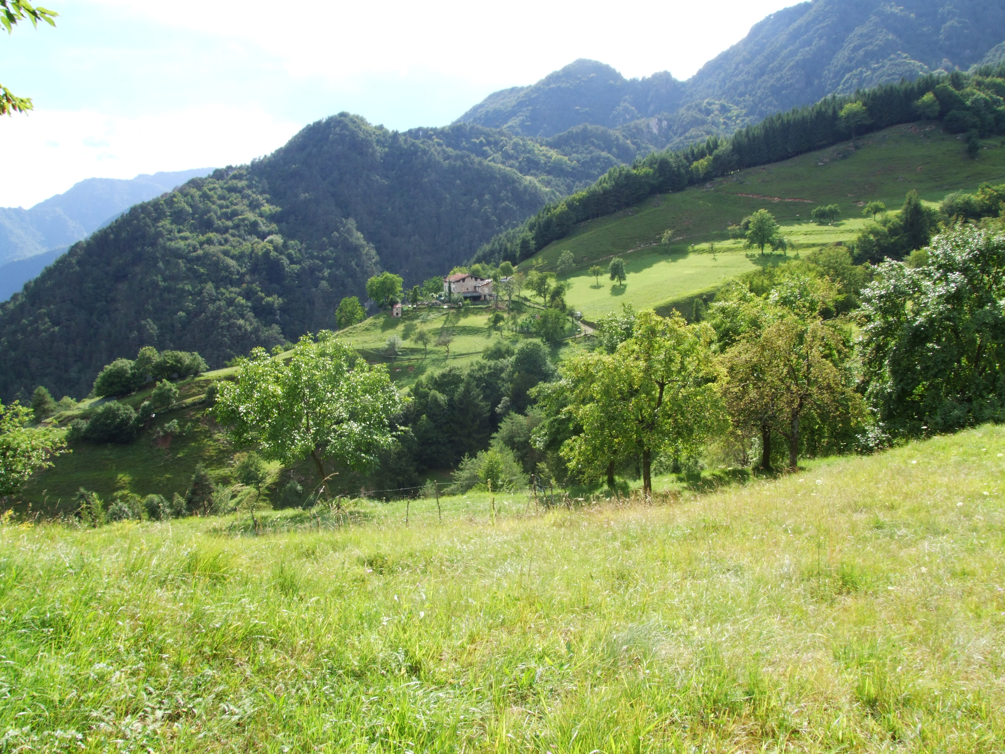 località Corsenich a Droane di Valvestino in provincia di Brescia (Italia)